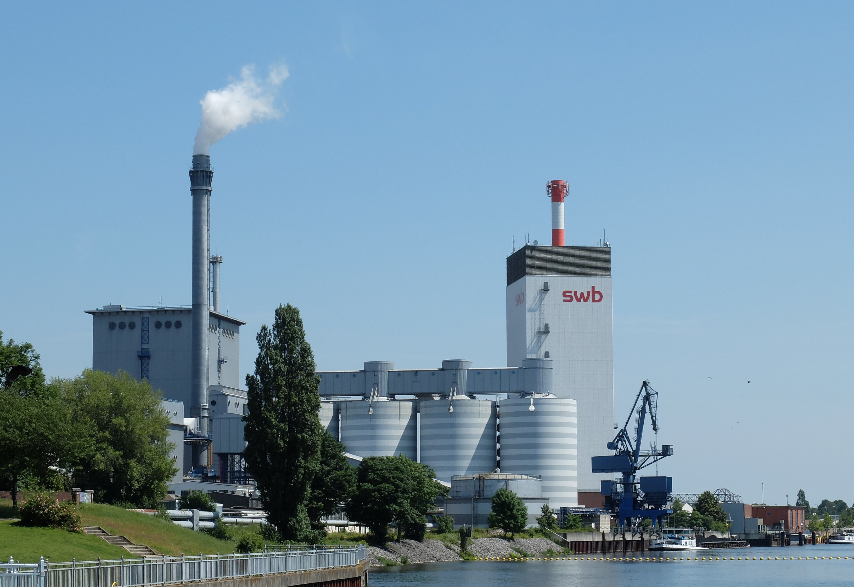 Kraftwerk Bremen-Hastedt as seen from Weserwehr